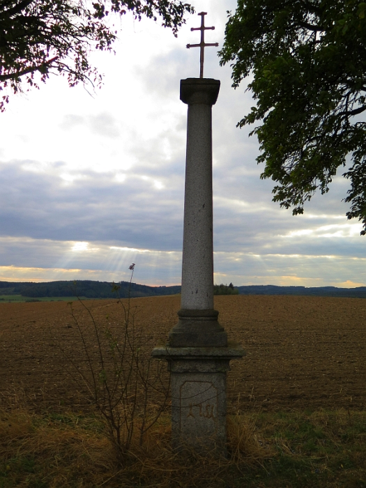 Boží muka, směr Nevželice, Uzenice.